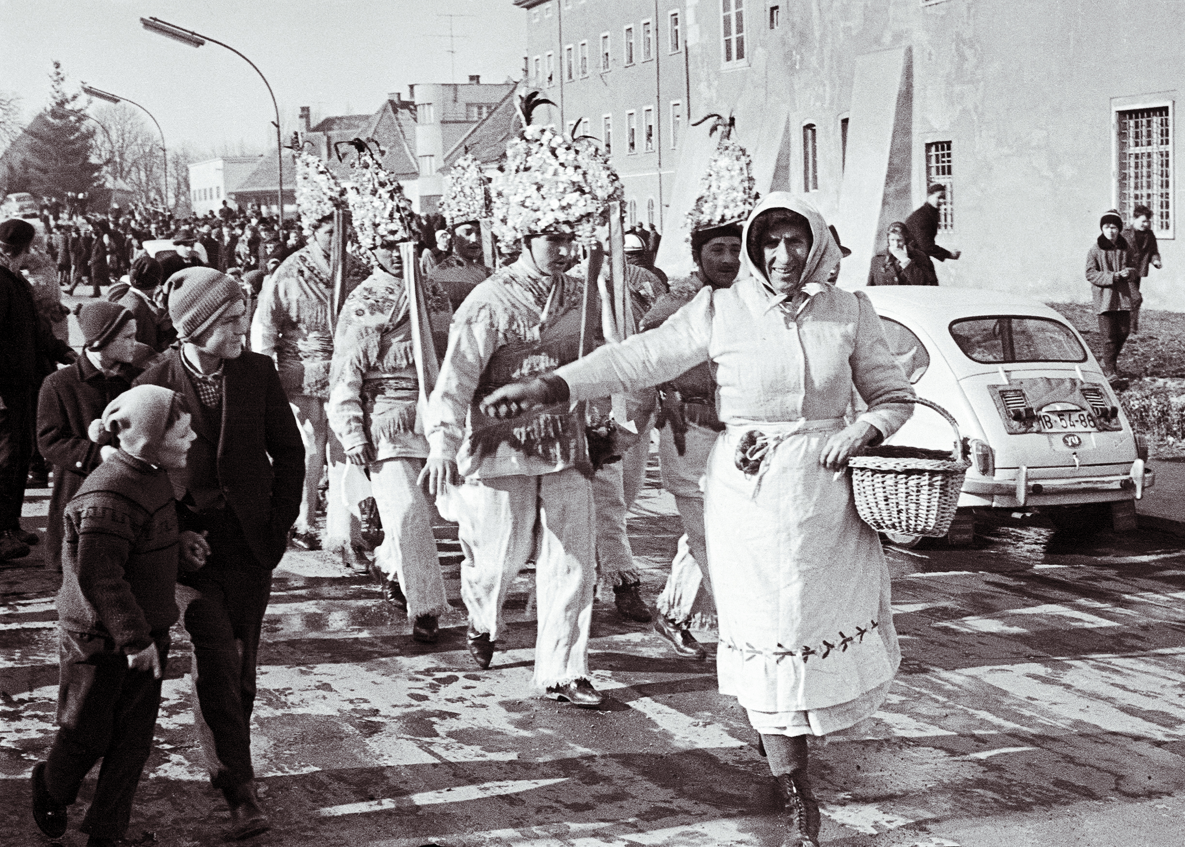 Kurentovanje na Ptuju